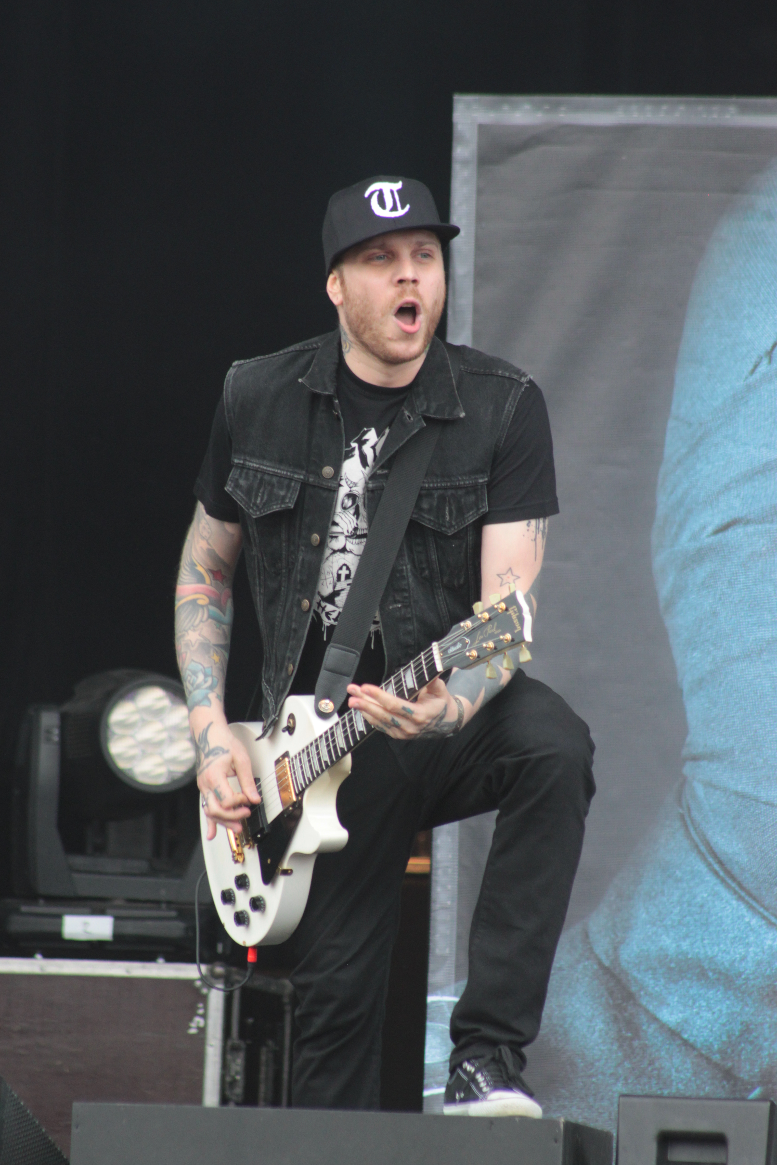 Mass Hysteria, Helfest 2013, Fr-44-Clisson.